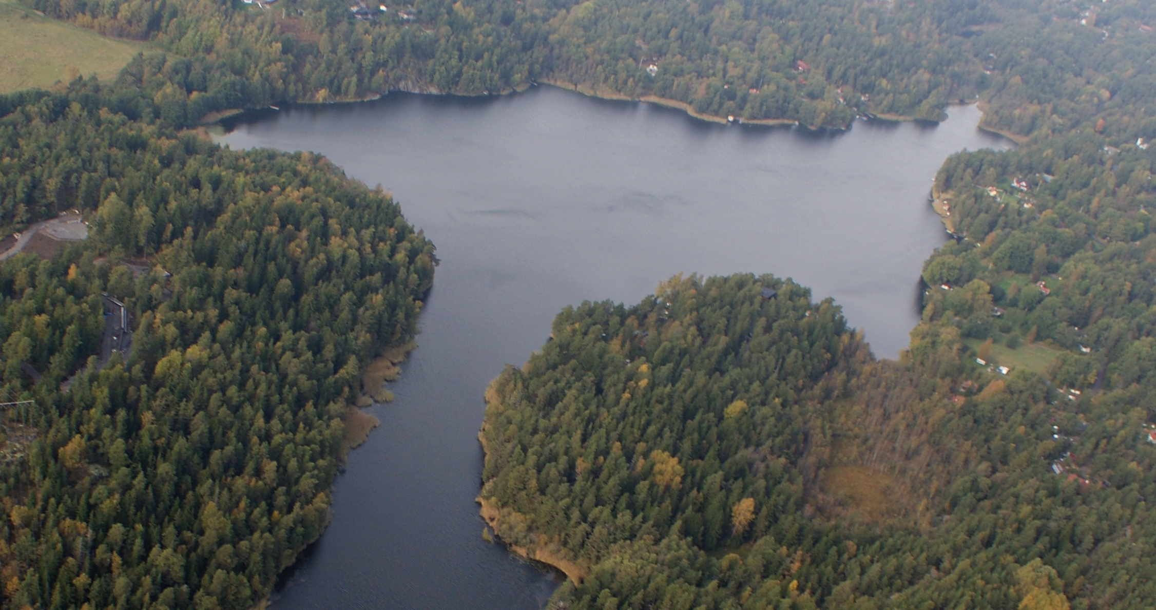 Norra Sågsjön sedd från helikopter.